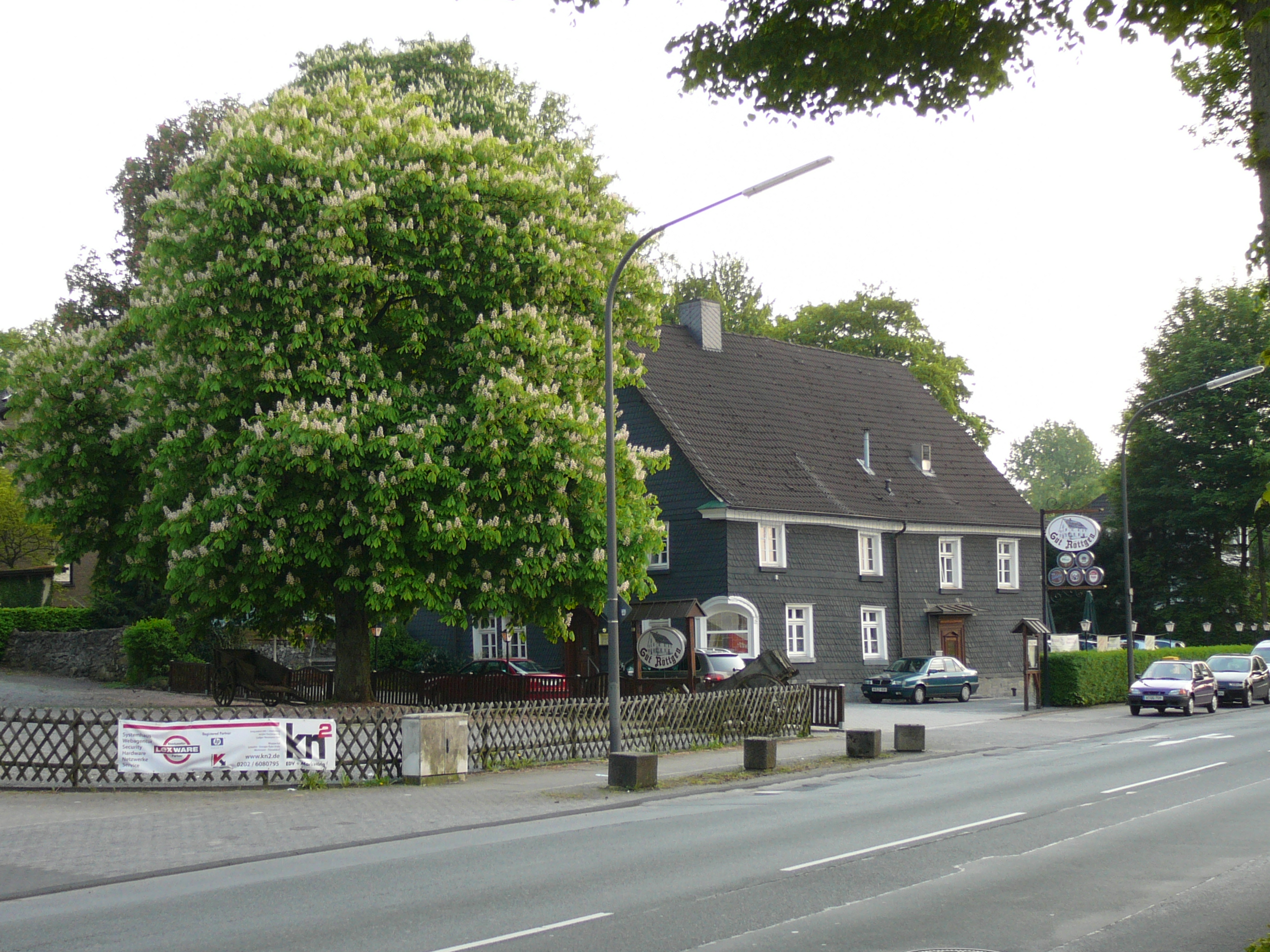 Schwelmer Straße, Wuppertal